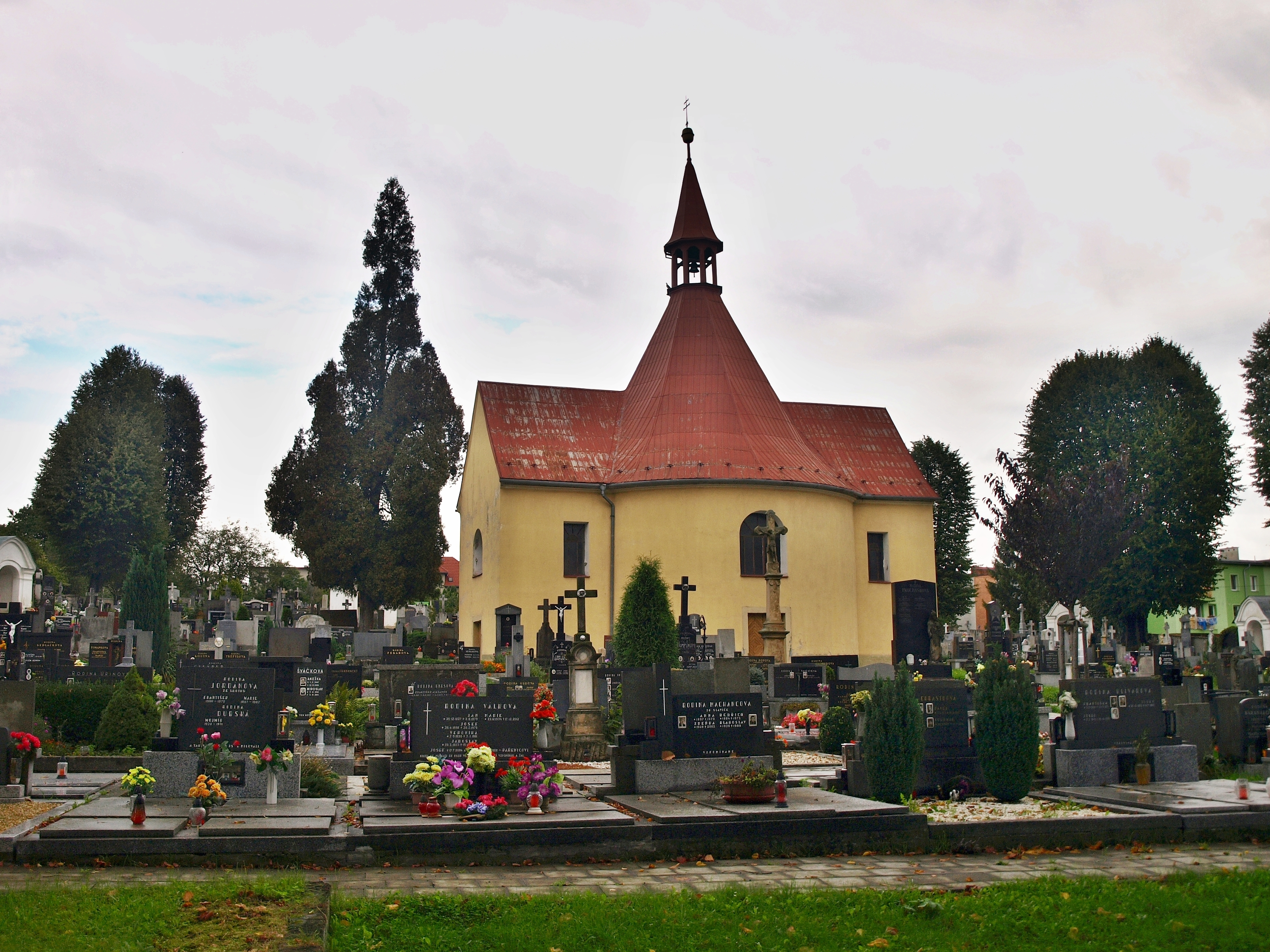 Hřbitov a kaple, Drahotuše, lipnická ul.